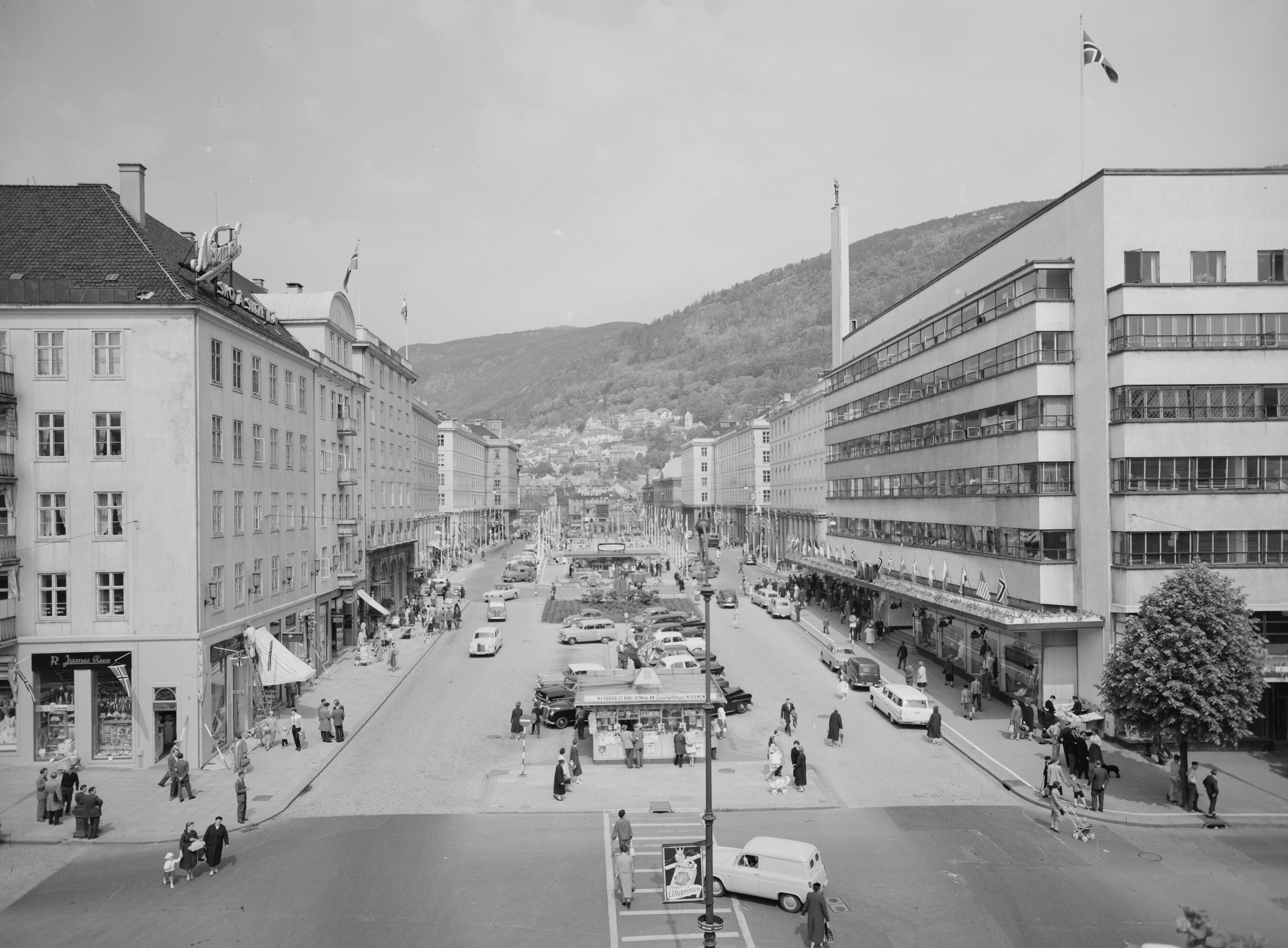 Bildet er hentet fra Nasjonalbibliotekets bildesamling Bergen, Bergen, Hordaland